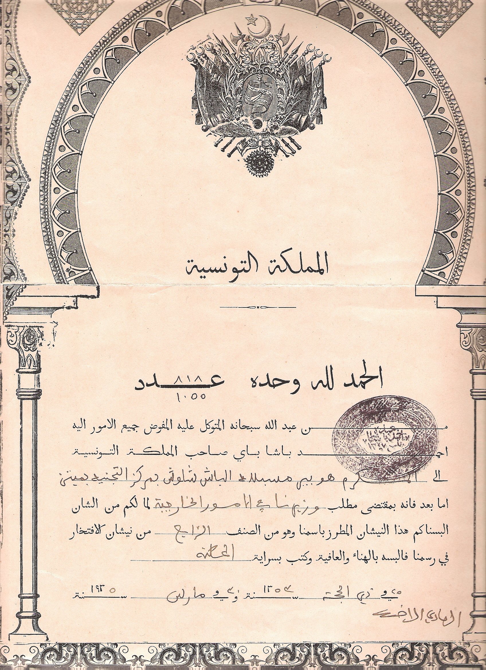 Description Description Médaille nichan-Iftikar, en arabe (Mespléde hubert) Date1935 TunisieSourceSelf-photographedAuthorlecomte didierPermission (Reusing this file) libre de droit Description Médaille nichan-Iftikar, en arabe (Mespléde hubert)